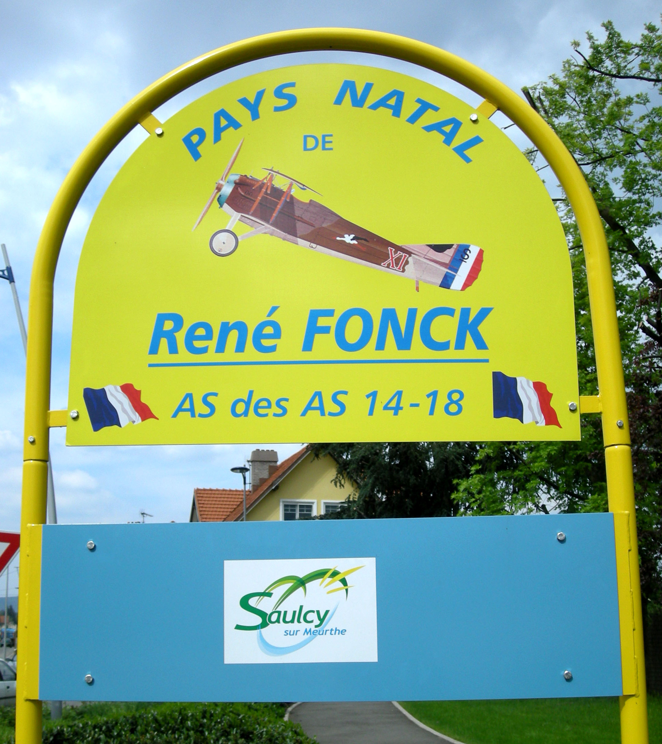 Saulcy-sur-Meurthe (Vosges), pays natal de l'aviateur René Fonck